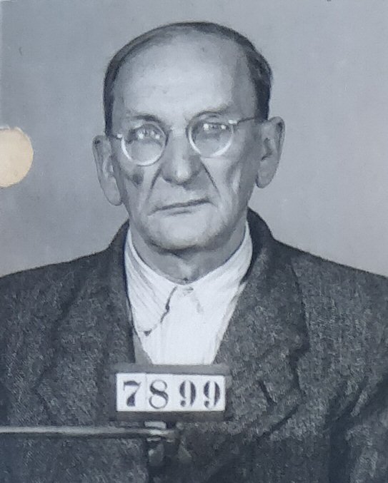 Politický vězeň Bohumil Rychtr - úřední fotografie z vězeňské karty, pořízená při nástupu do věznice Valdice v roce 1952. Patrné stopy po bití při výsleších na služebně StB v Liberci.